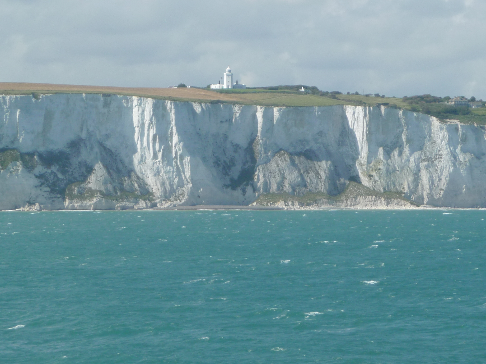 White Cliffs of Dover